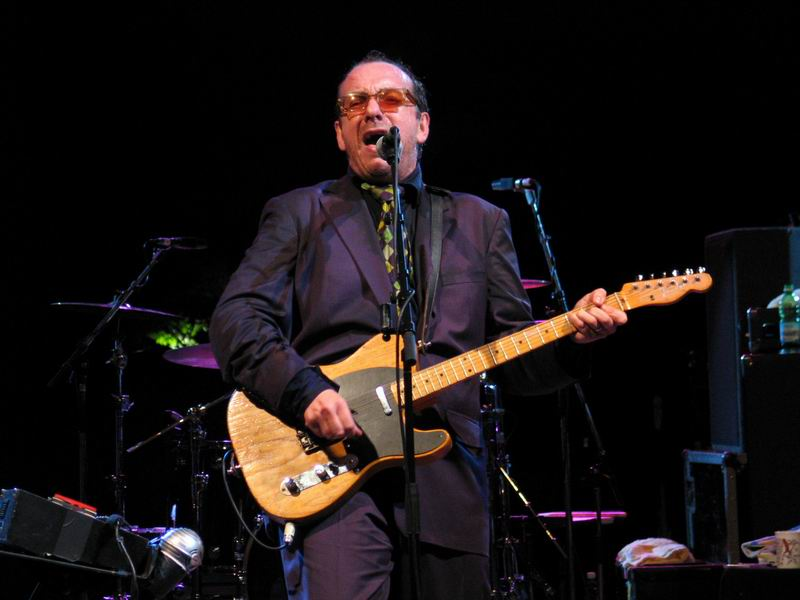 elvis costello, villa solaria, sesto fiorentino, italy, 15/06/2005